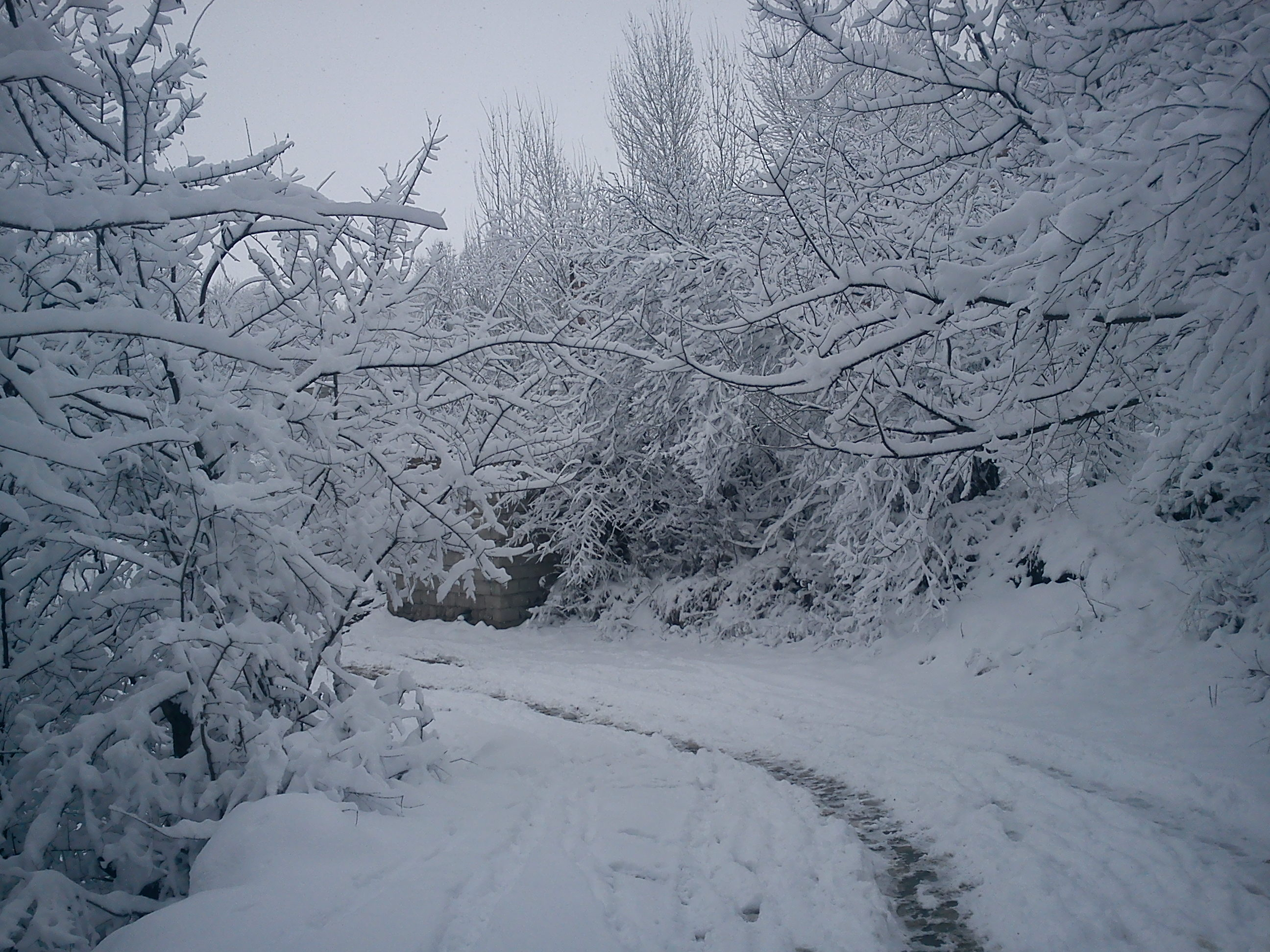 زمستان1